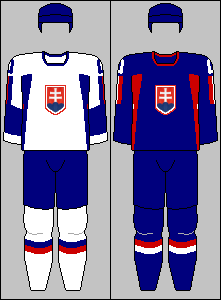 Slovak national team jerseys from World Championships 2007-2008